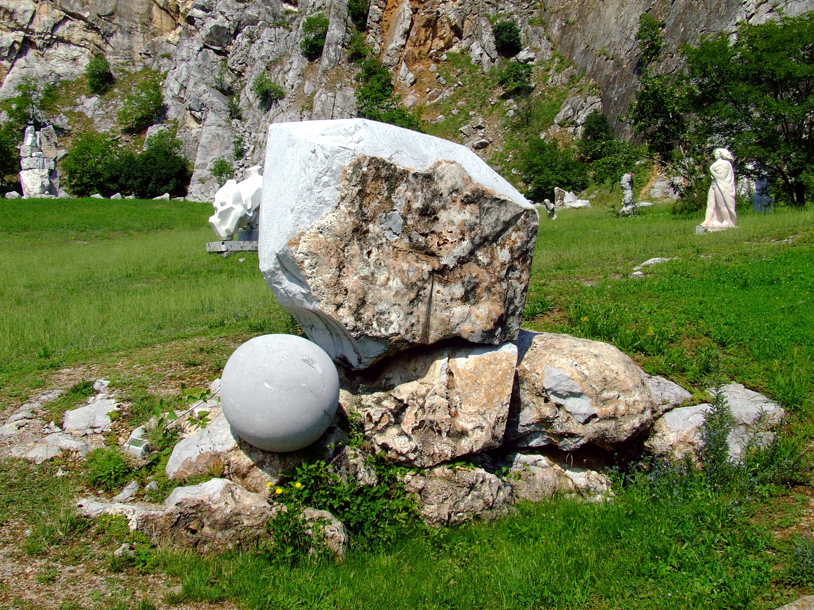 Mathias Hietz (*1923) Idea című műve a villányi (nagyharsányi) nemzetközi szoborparkban